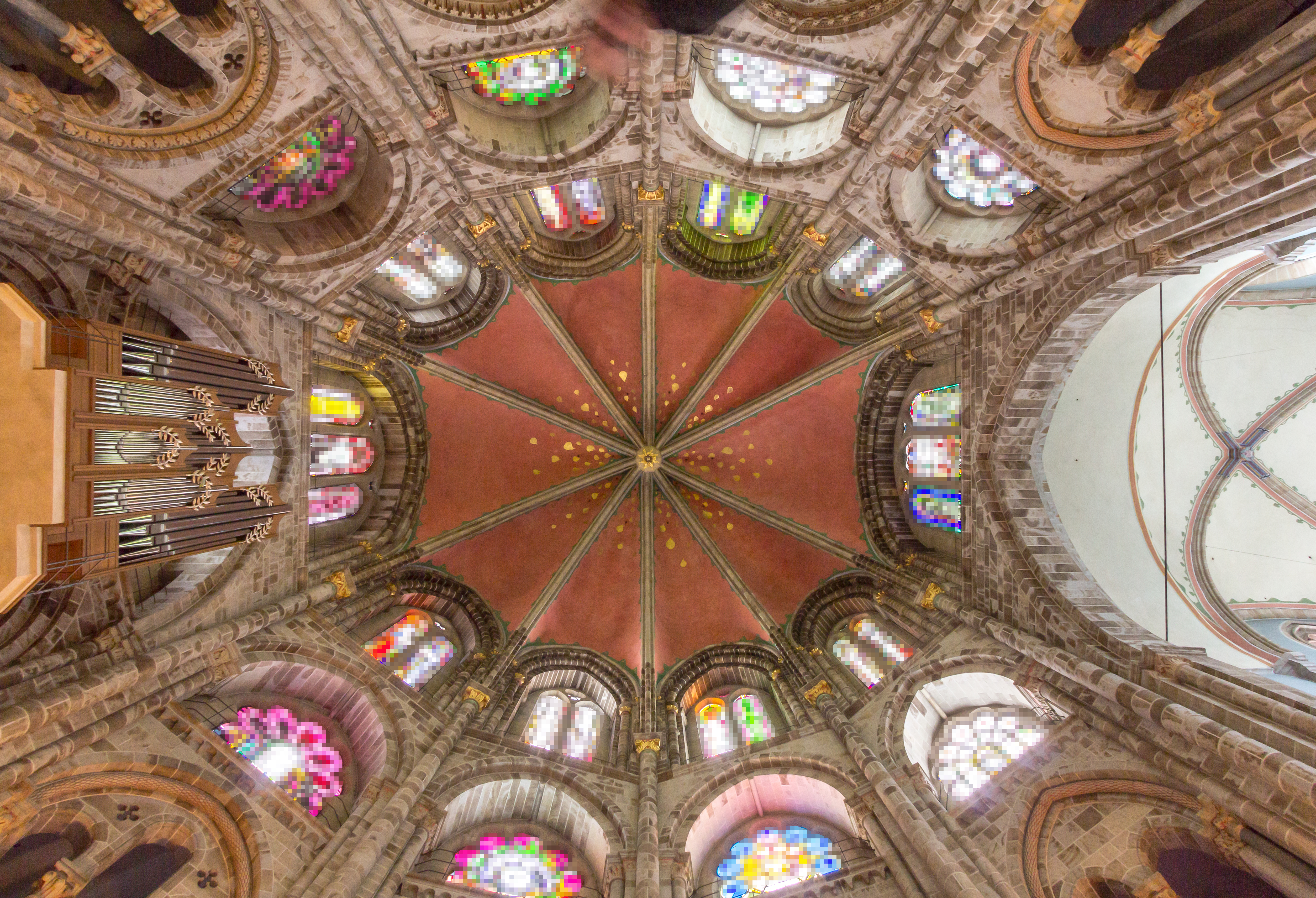 St. Gereon Köln - Dekagon This is a photograph of an architectural monument.